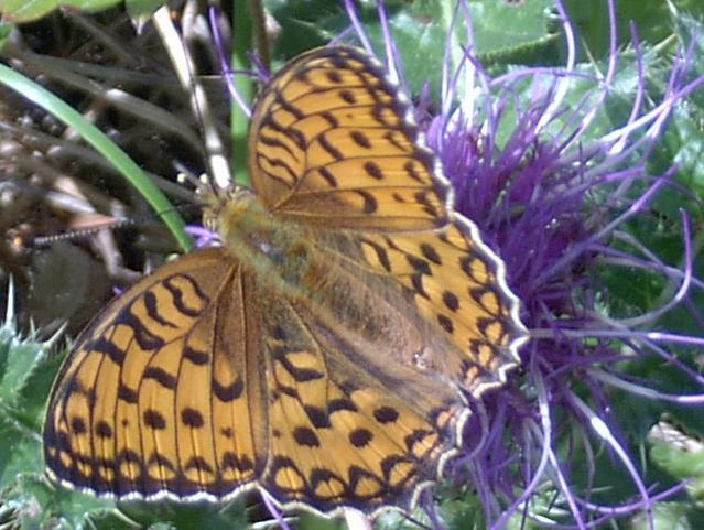 Skogspärlemorfjäril, Argynnis adippe, from a few kilometers south of Katthammarsvik, Gotland, Sweden. Photographed by Jonna Engstrand in July 2005.